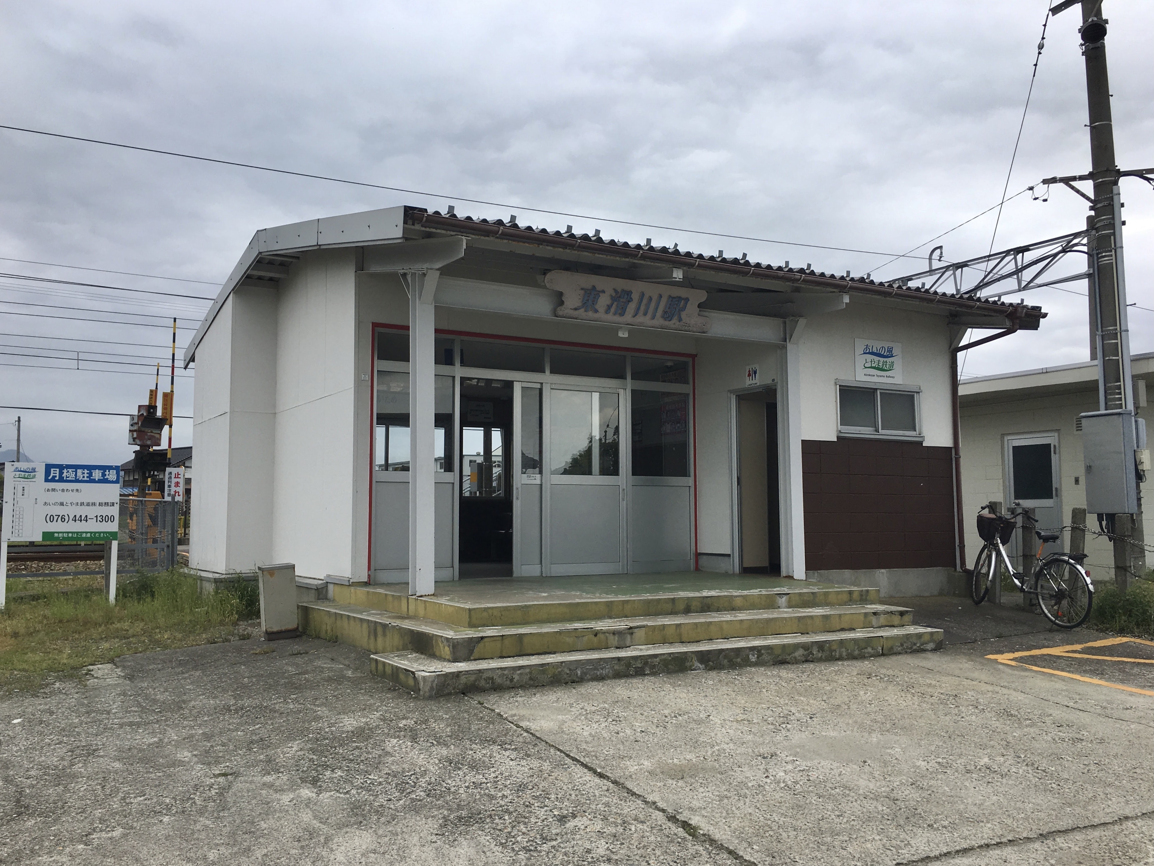 あいの風とやま鉄道東滑川駅駅舎